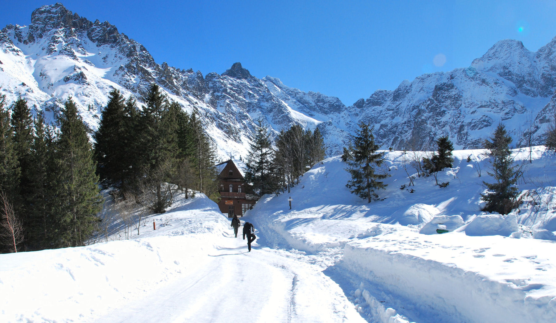 Zima nad Morskim Okiem od strony Włosienicy